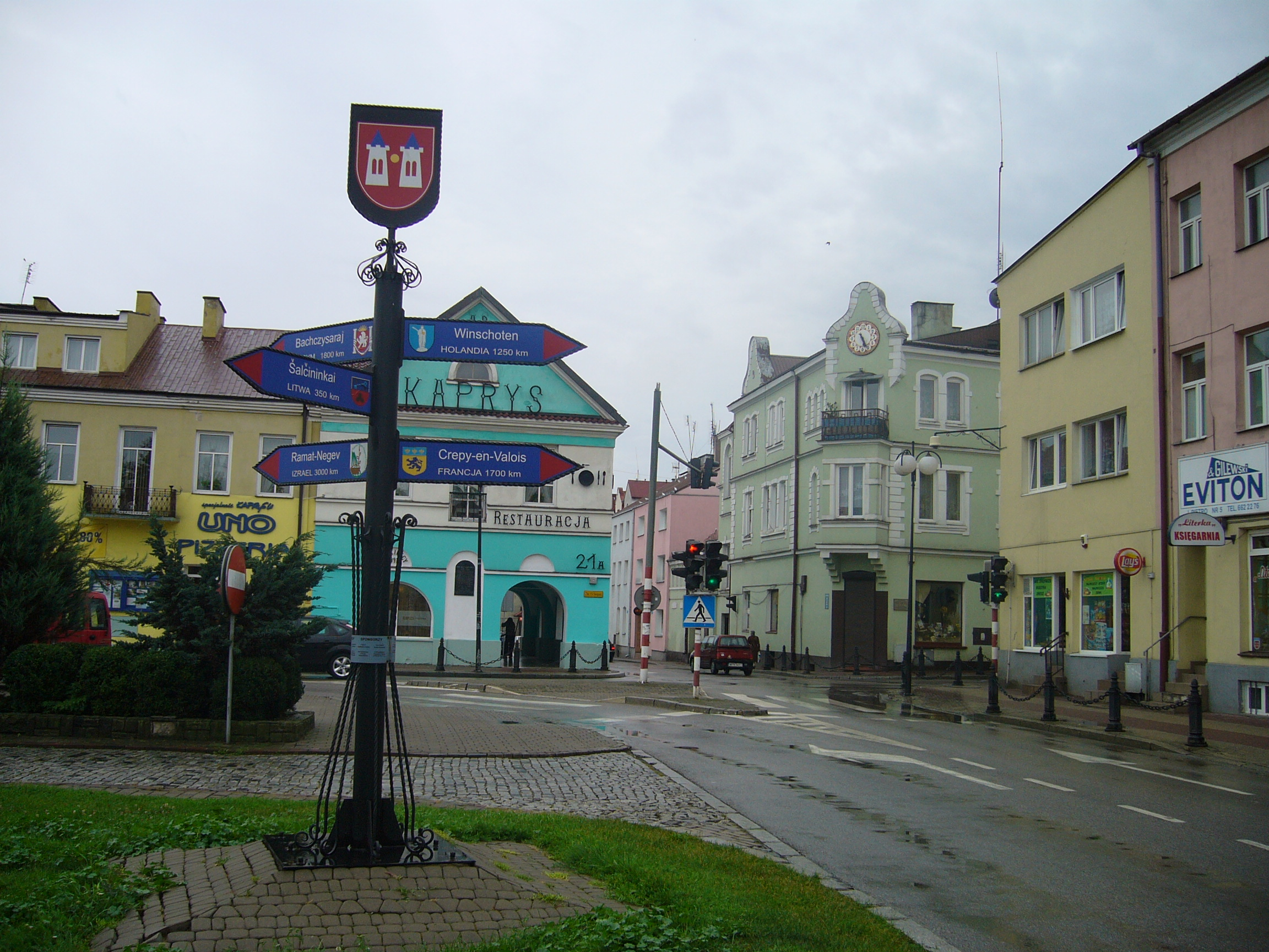 w sercu Płońska